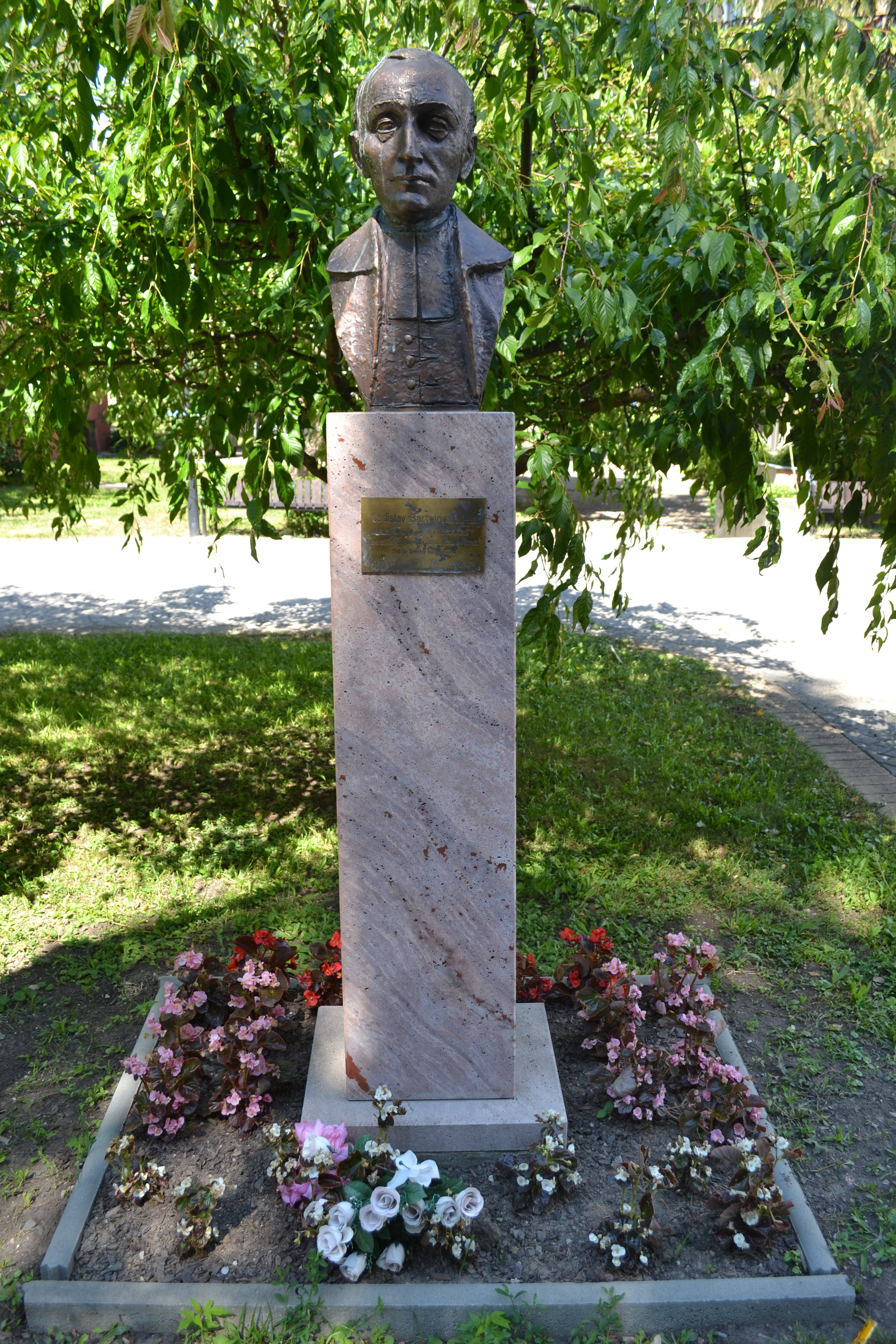 Bronzová busta evanjelického kňaza Ladislava Bartholomeidesa